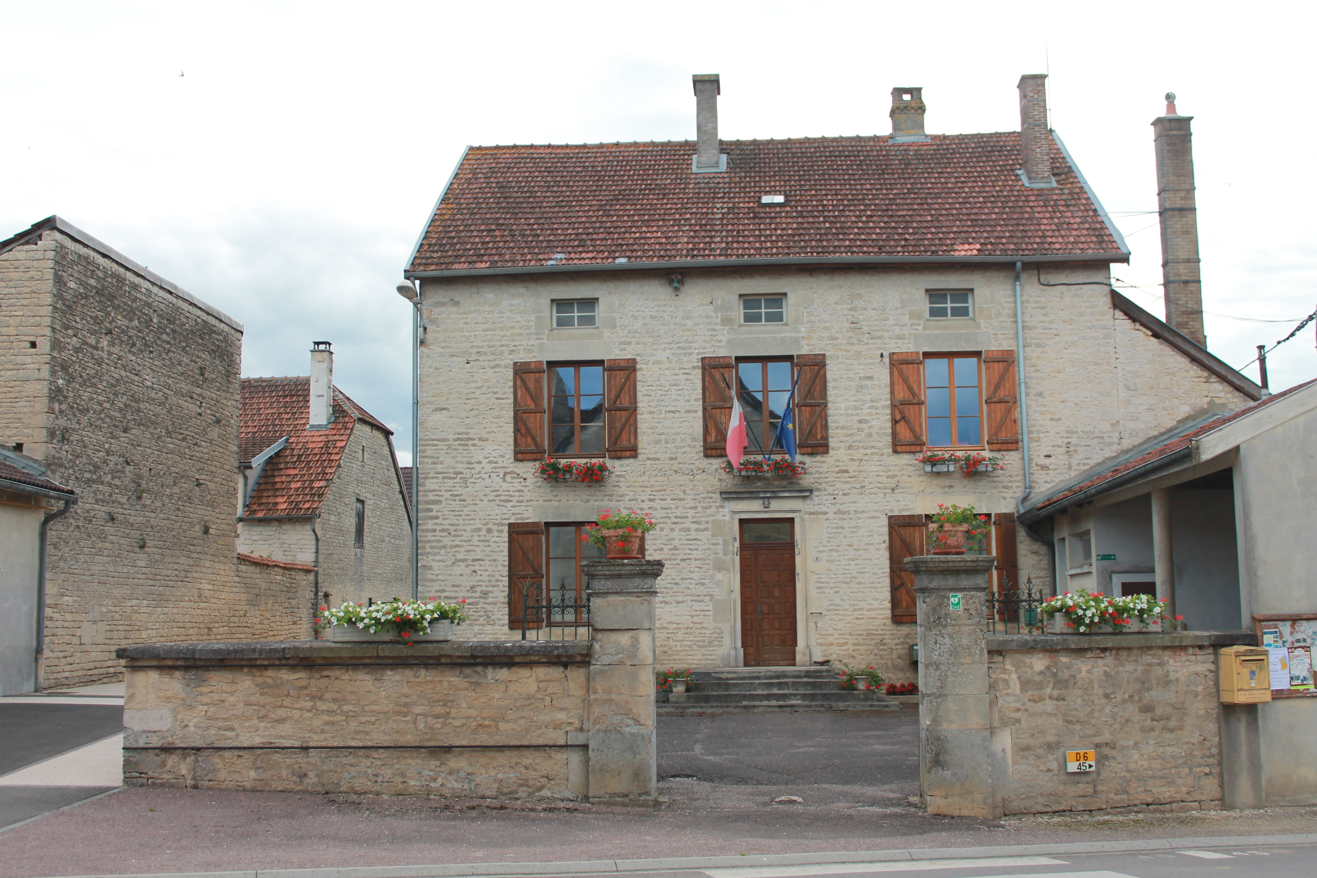 Un des nombreux charmes de notre joli petit village de PONT LA VILLE en Haute Marne